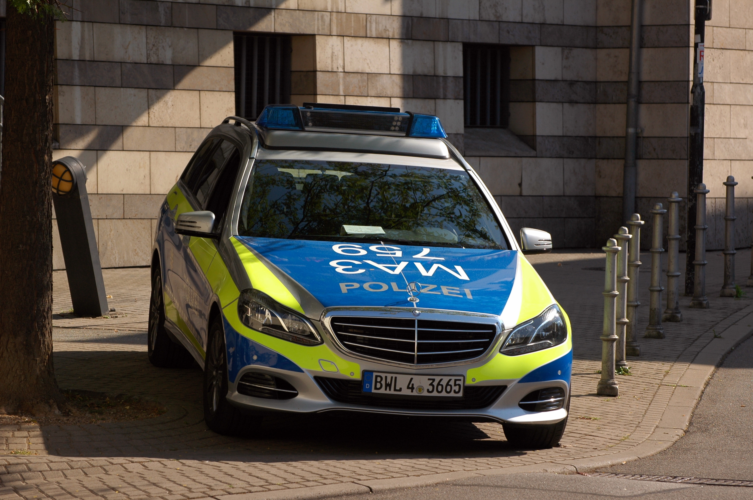 Mercedes-Benz Polizei MA3-759 BWL4 3665 in Heidelberg.